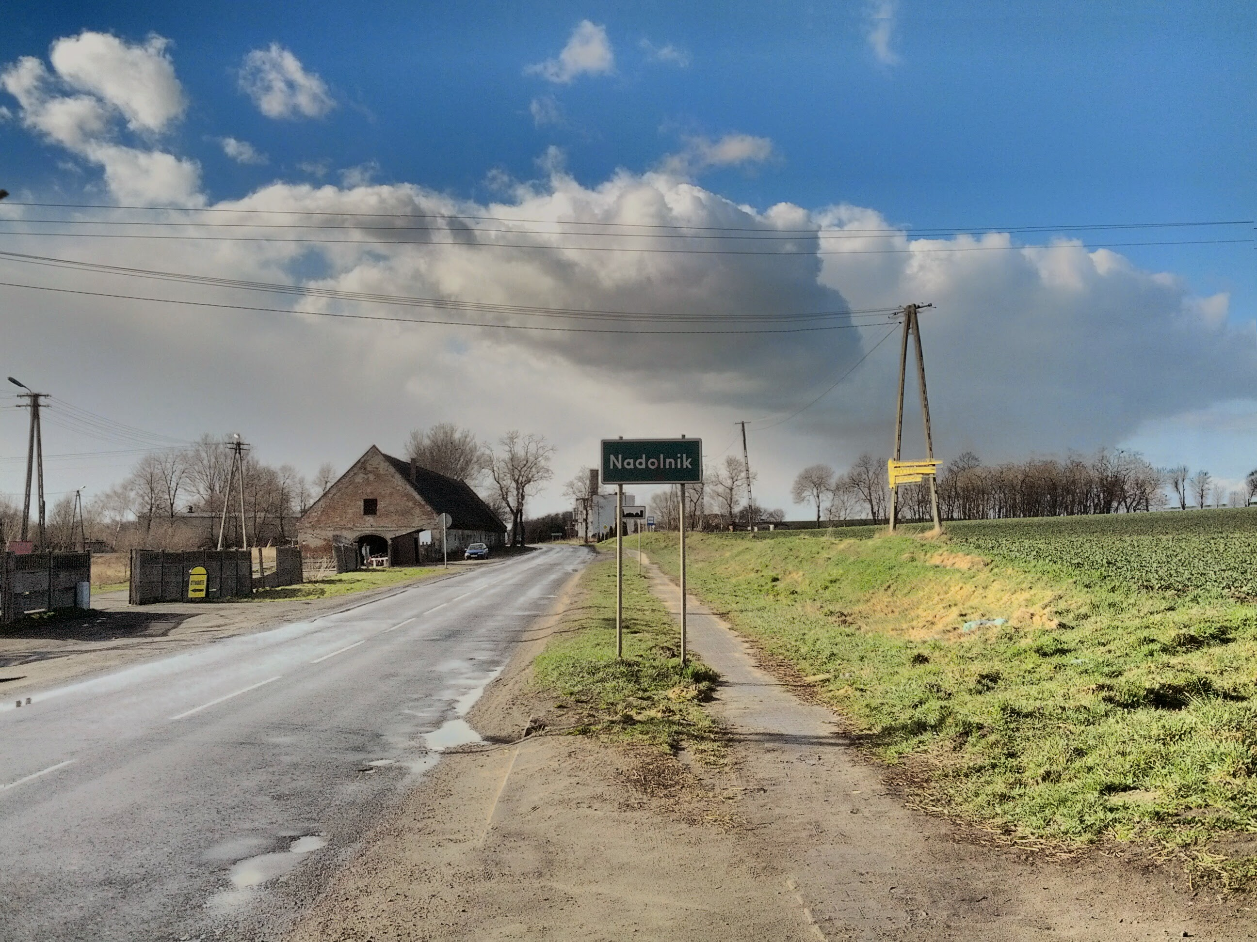 Nadolnik, powiat kościański, gmina Śmigiel.